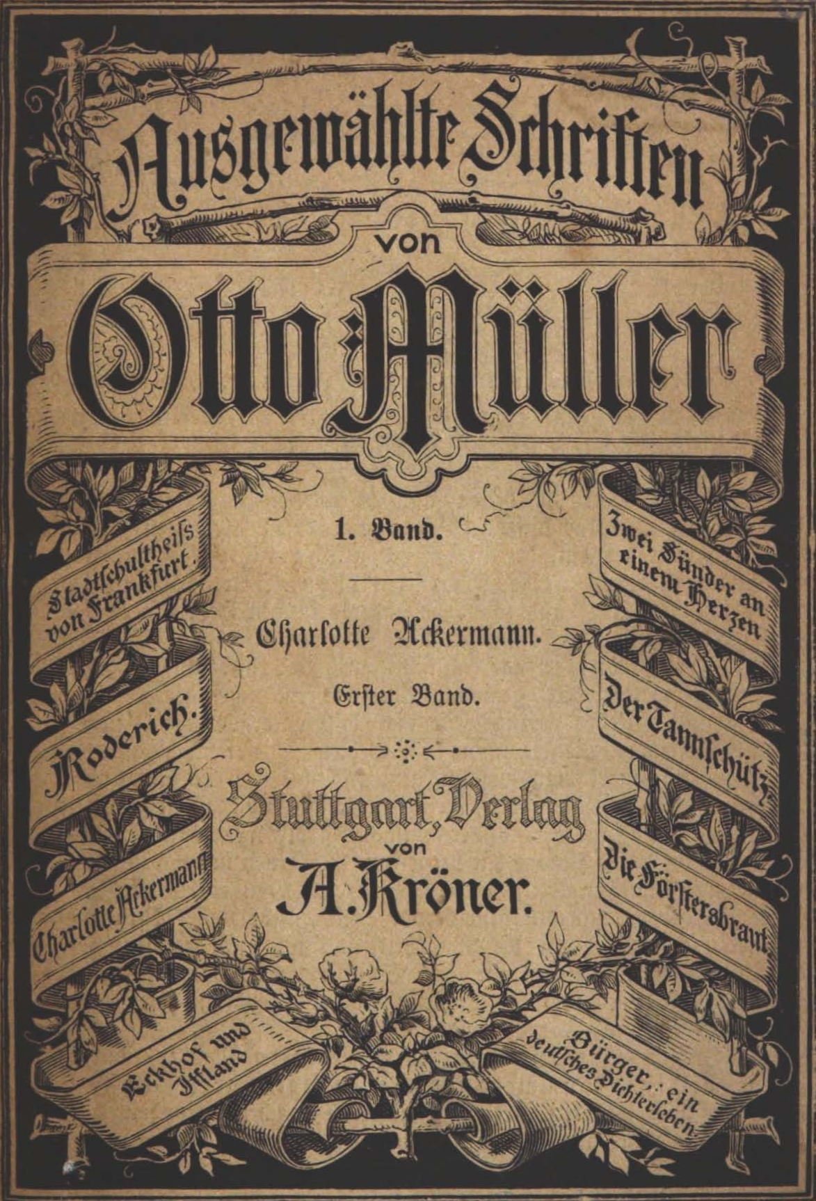 Otto Müller, Ausgewählte Schriften, Band 1, Charlotte Ackermann, 1873, Titelseite.